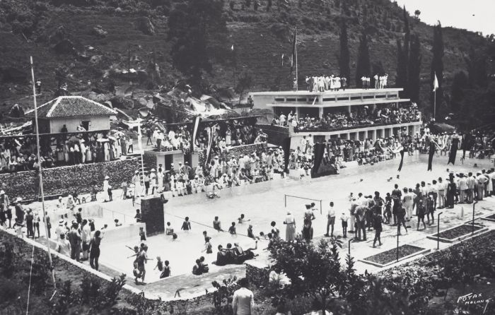 Foto. Tijdens de opening van het zwembad "Selecta" te Poenteno in de Residentie Malang